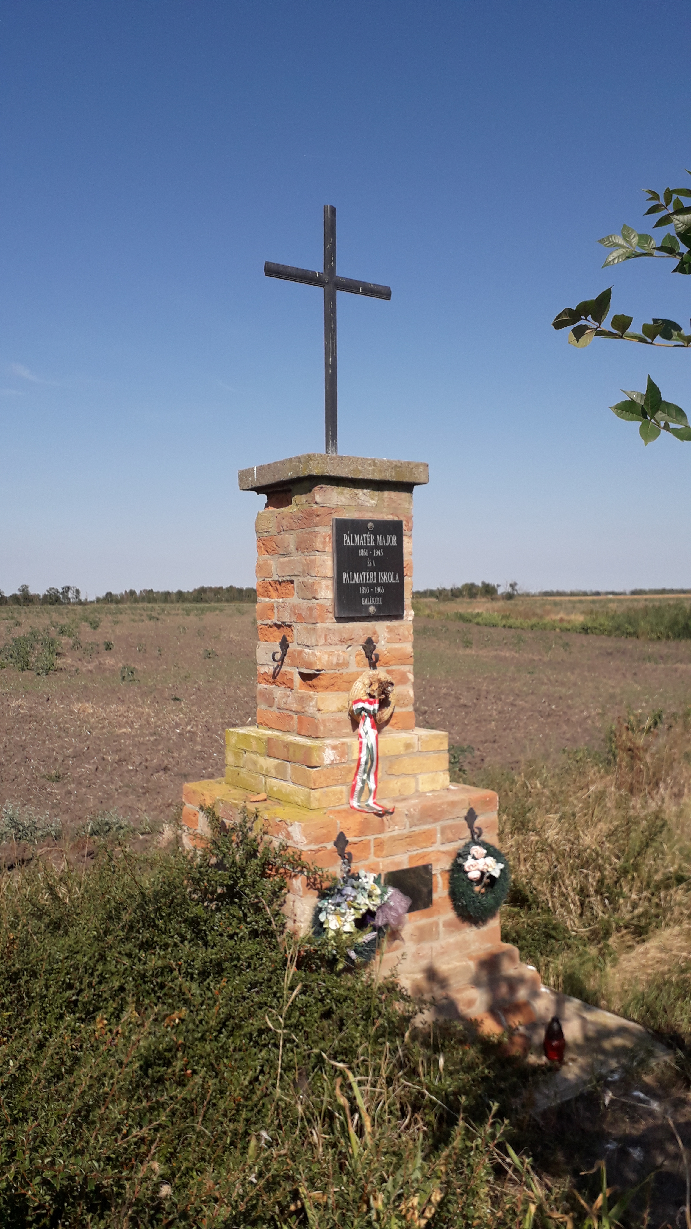 Pálmatér major és a pálmatéri iskola emlékműve